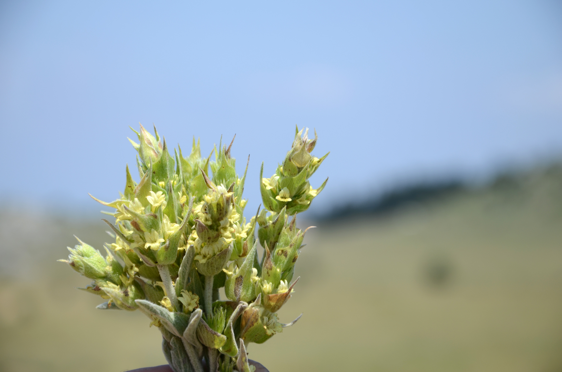 Τσάι στην κορυφή του Πάρνωνα This is a photography of Natura 2000 protected area with ID GR2520006